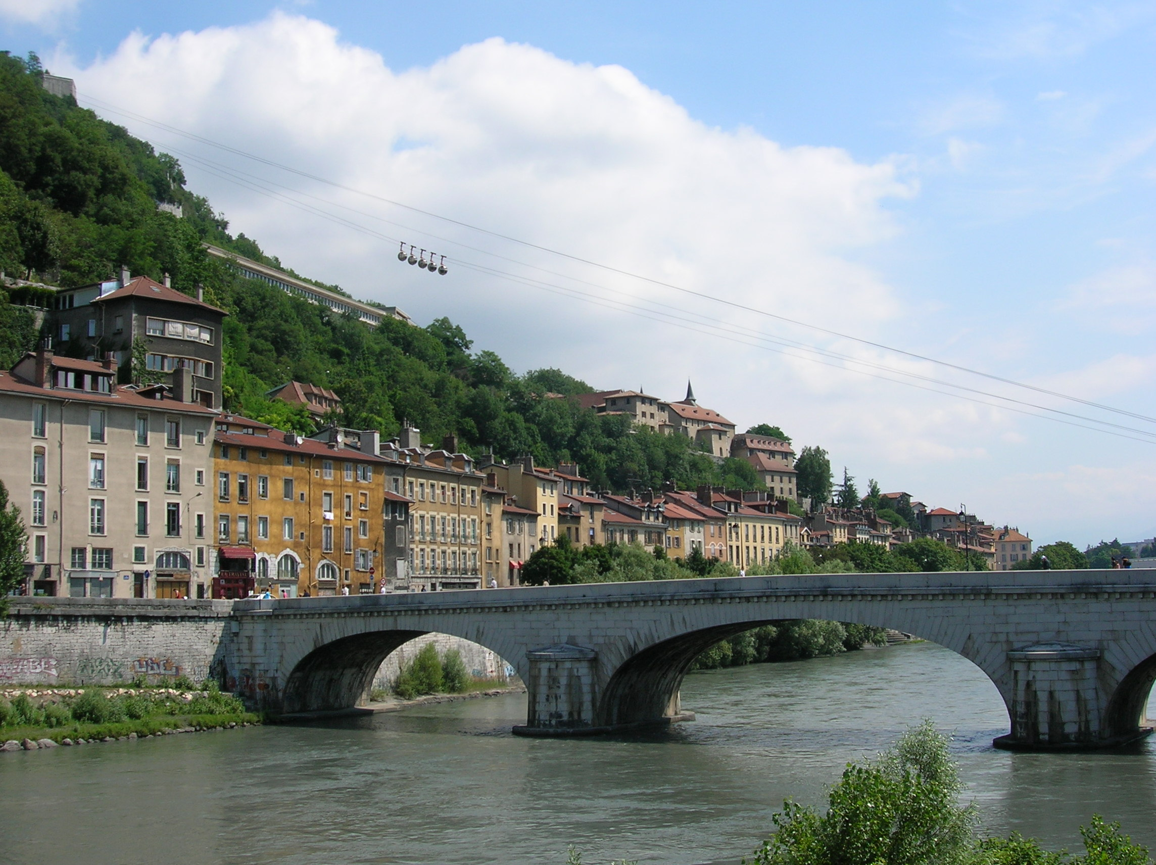 Pont Marius Gontard, sur l'Isère, à Grenoble. my own photograph